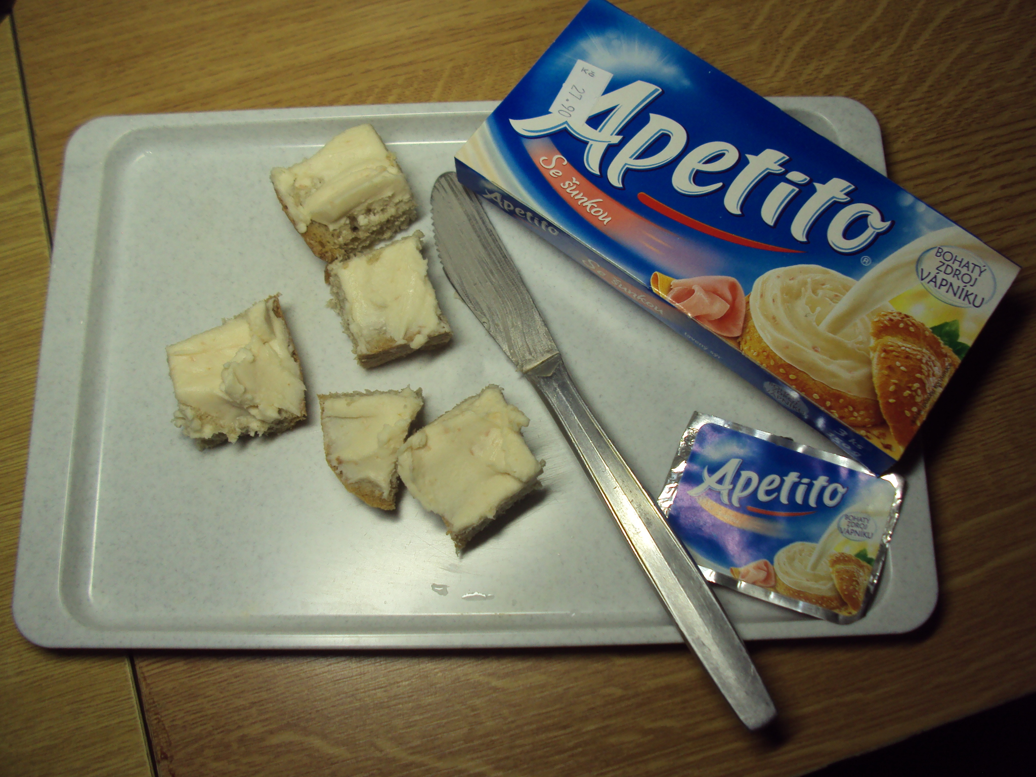 Český sýr Apetito